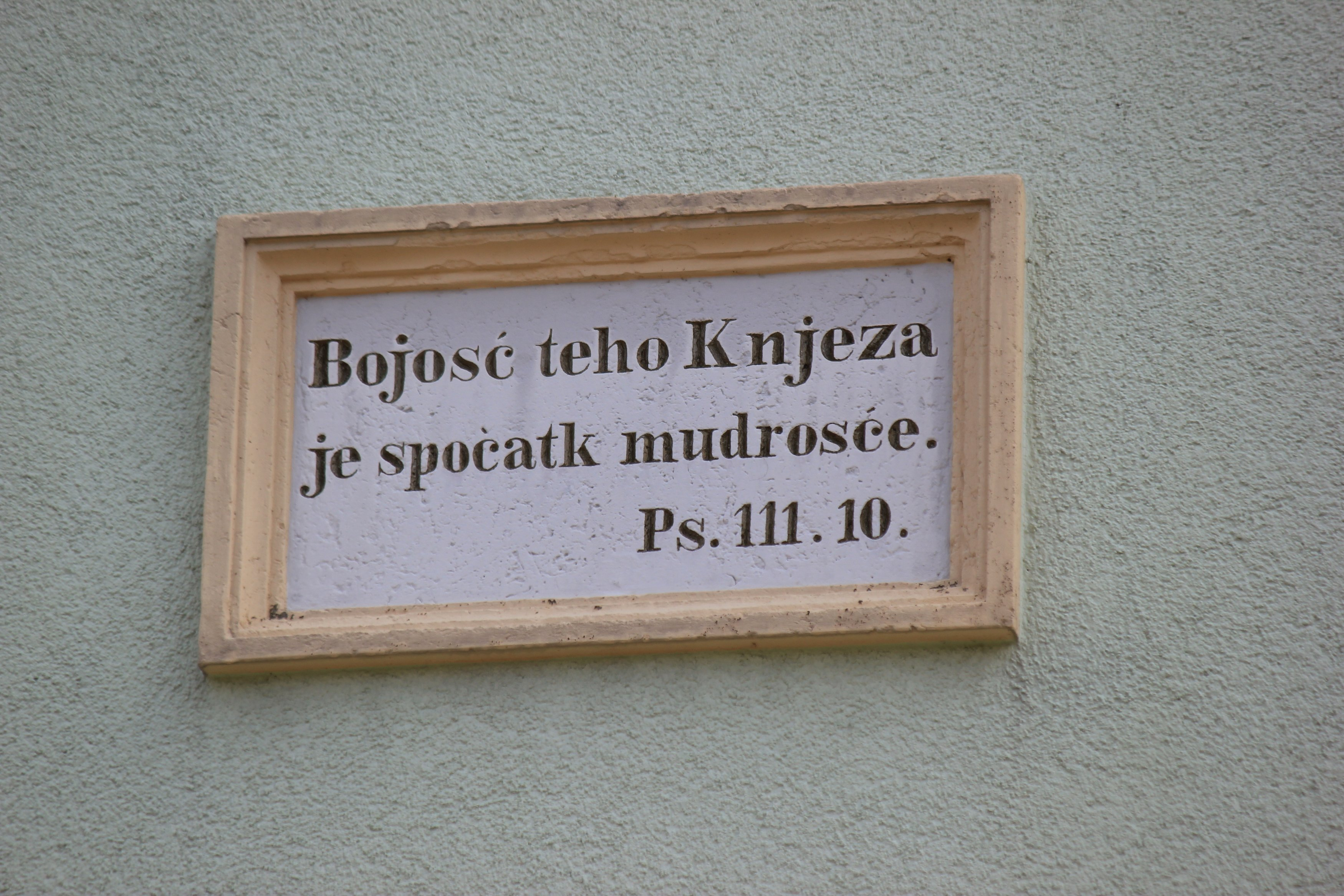 Hornjoserbsce: Tafla ze serbskim napisom při něhdyšej šuli w Čerwjenych Noslicach.